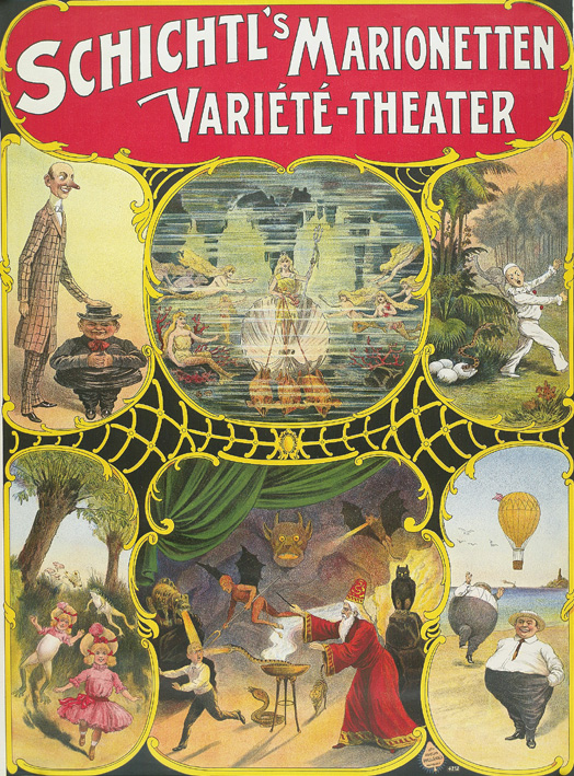 Plakat für Schichtl’s Marionetten-Varieté-Theater, Farblitho 95.5 x 71.5 cm, Adolph Friedländer Nr. 4712, um 1908. Zeigt sechs Motive mit unterschiedlichen Figuren wie Meerjungfrauen, Pantomimen, Zauberer, Schlangen, Kindern etc. Die Darstellungen sind durch gelbe Rankenumrandungen absetzt und werden durch den Schriftzug des Theaters bekrönt.